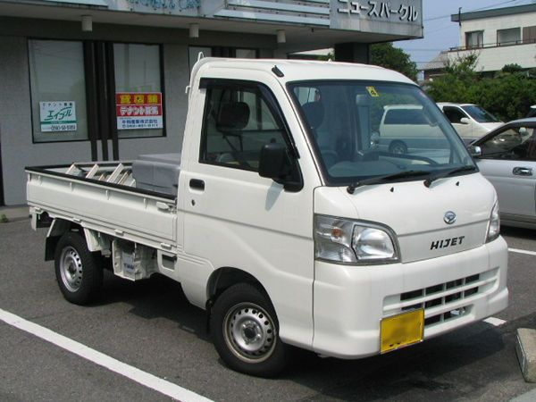 Daihatsu Hijet Ian Finnesey 2005